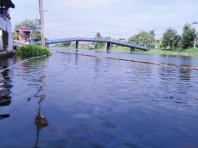 @คลองชัยพฤกษ์ หรือคลองมหาสวัสดิ์ เป็นคลองที่มีประวัติความเป็นมา ขุดขึ้นเมื่อพศ.2402